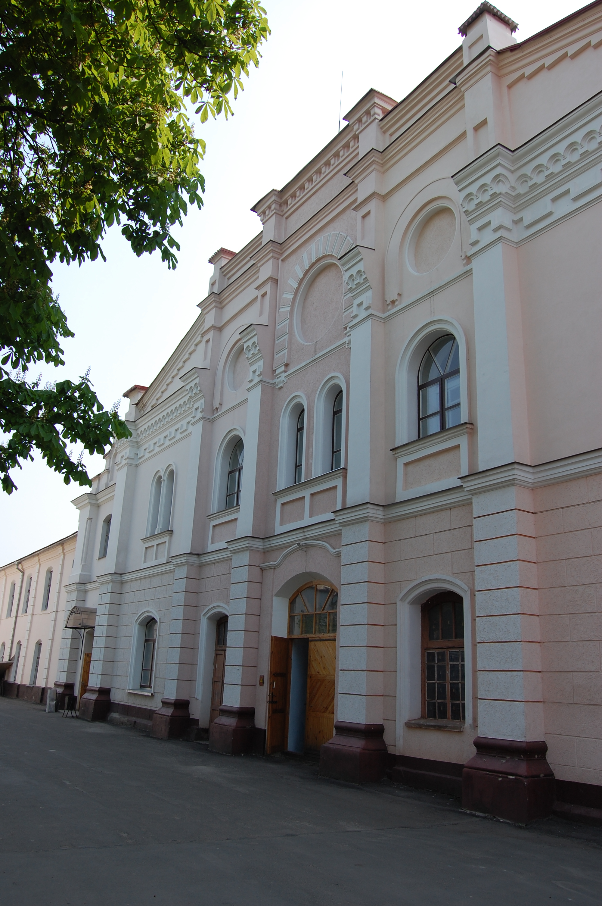 Синагога (мур.), Ковель, вул. Незалежності, 125